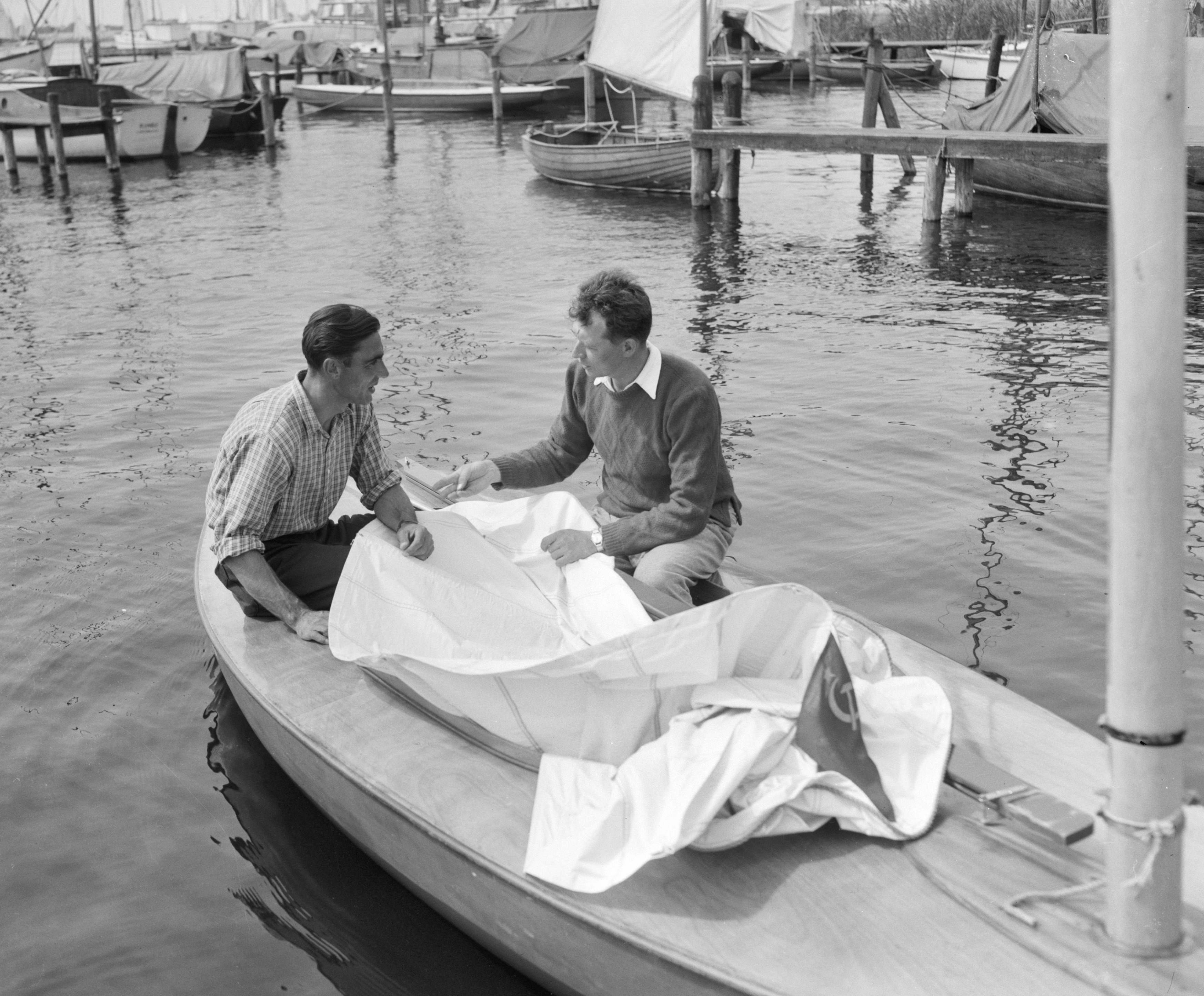 Europese kampioenschappen eemanszwaardboten [1]; rechts Bobe Markus, links Yurey Shavria (Rusland)